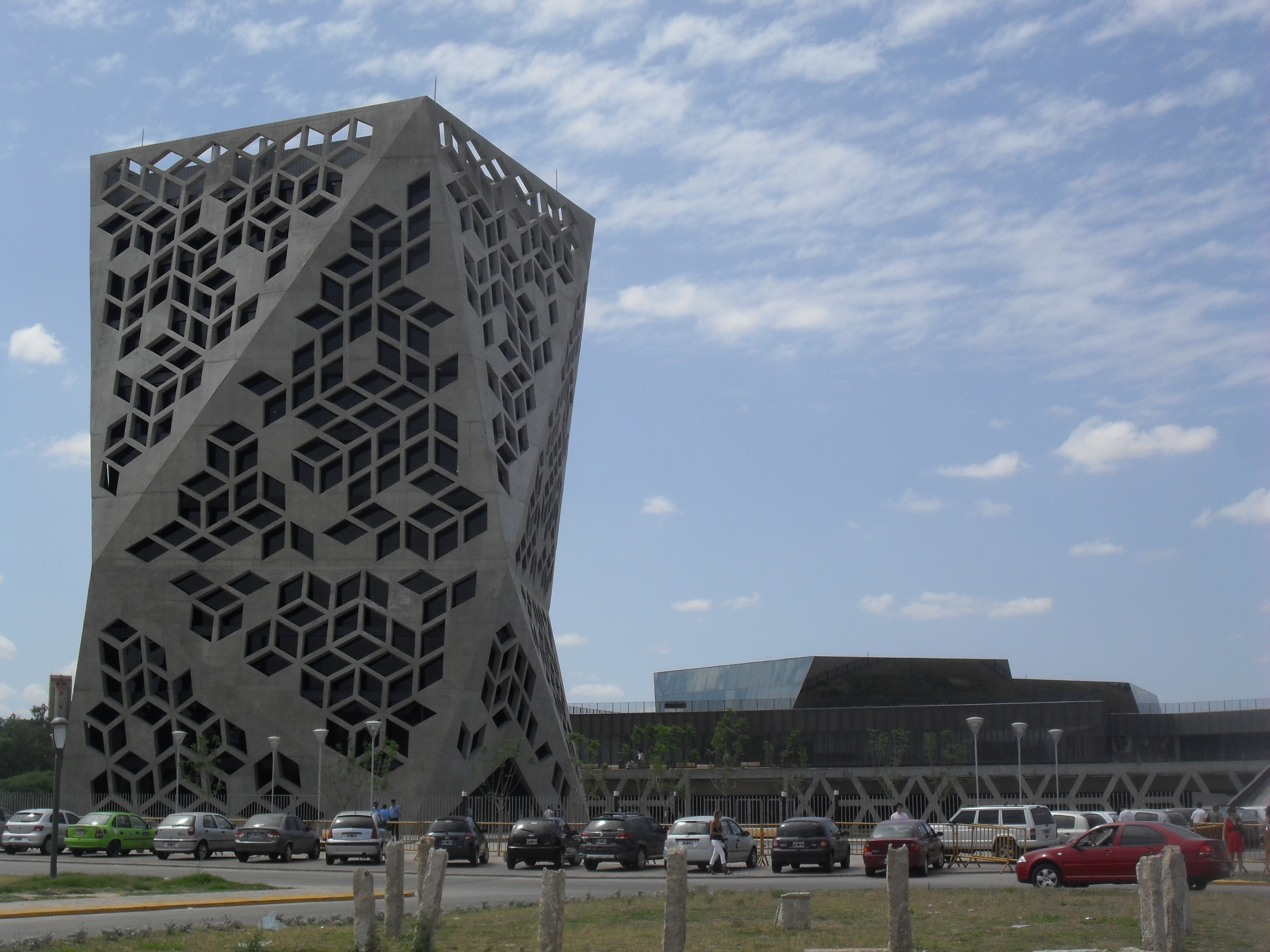 Nueva Sede del Gobierno de la Provincia de Córdoba (Argentina)